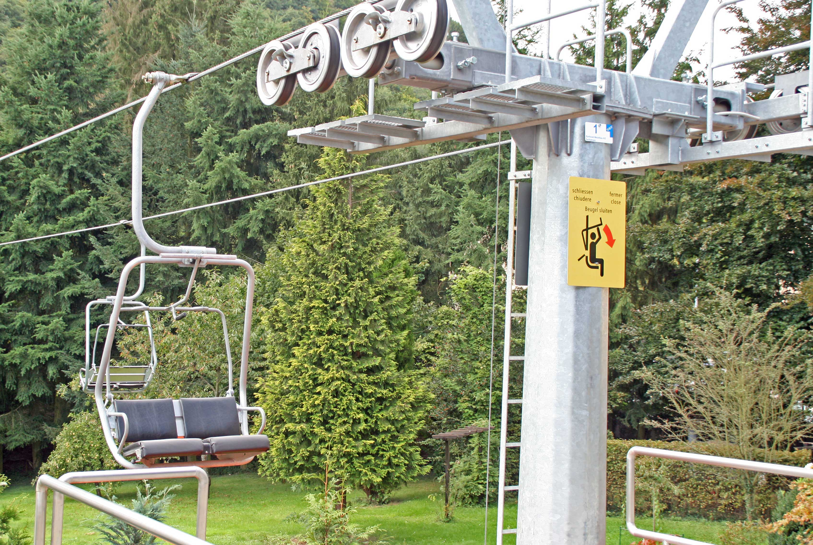 Ee Sesseli a vill Pullien.